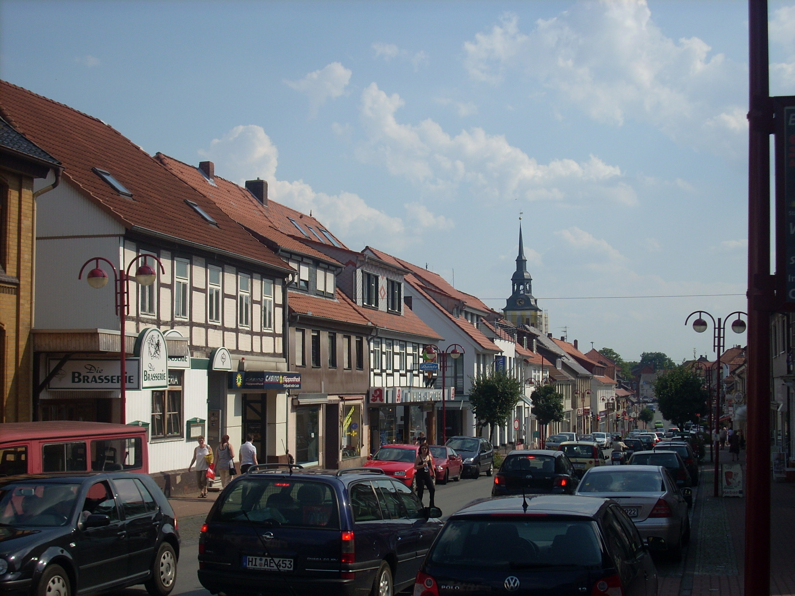 Elze, Hauptstraße nach Süden